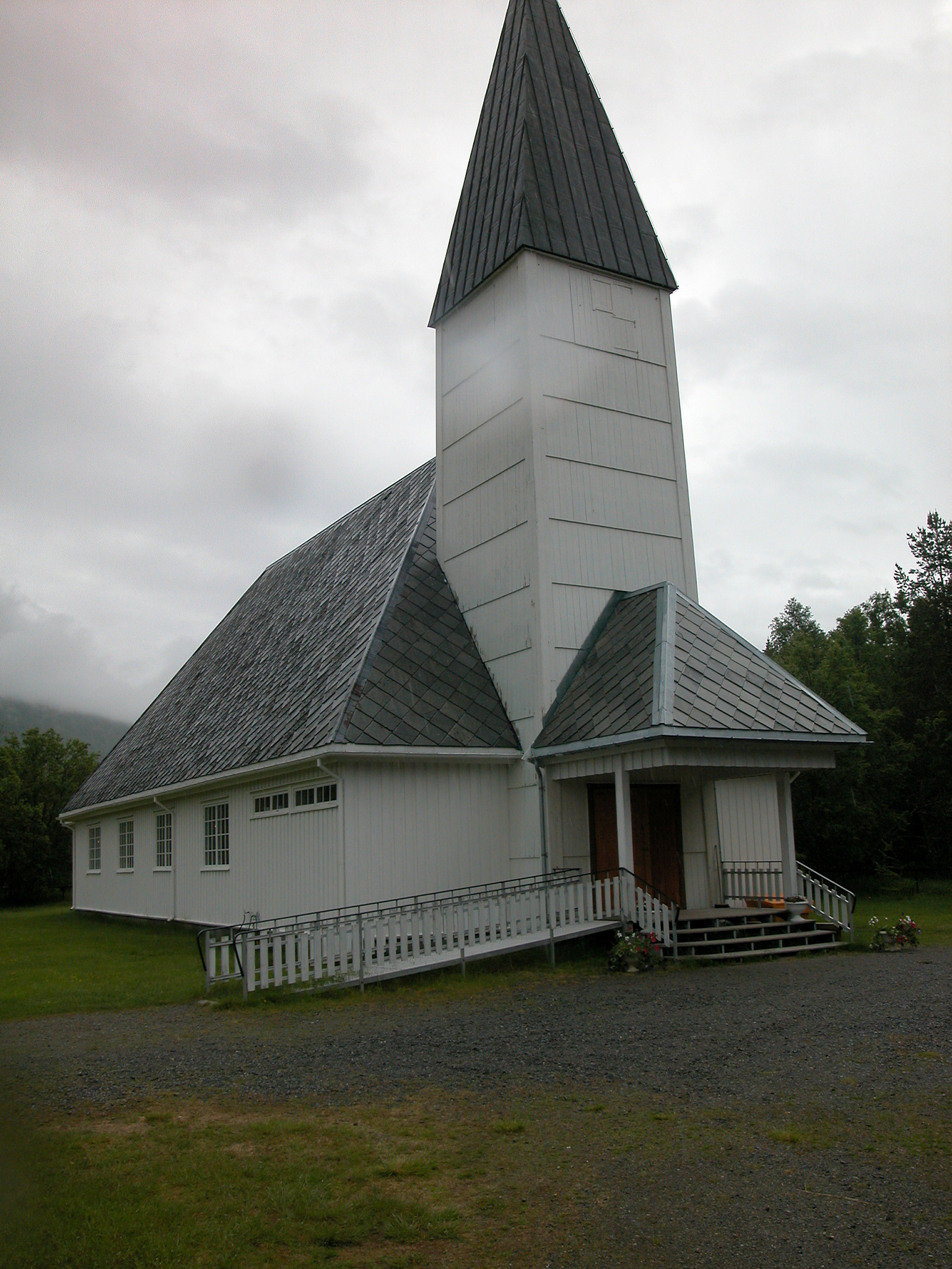 Storfjord kirke. Foto: Iver Schonhowd, fra Kulturminnebilder.no.